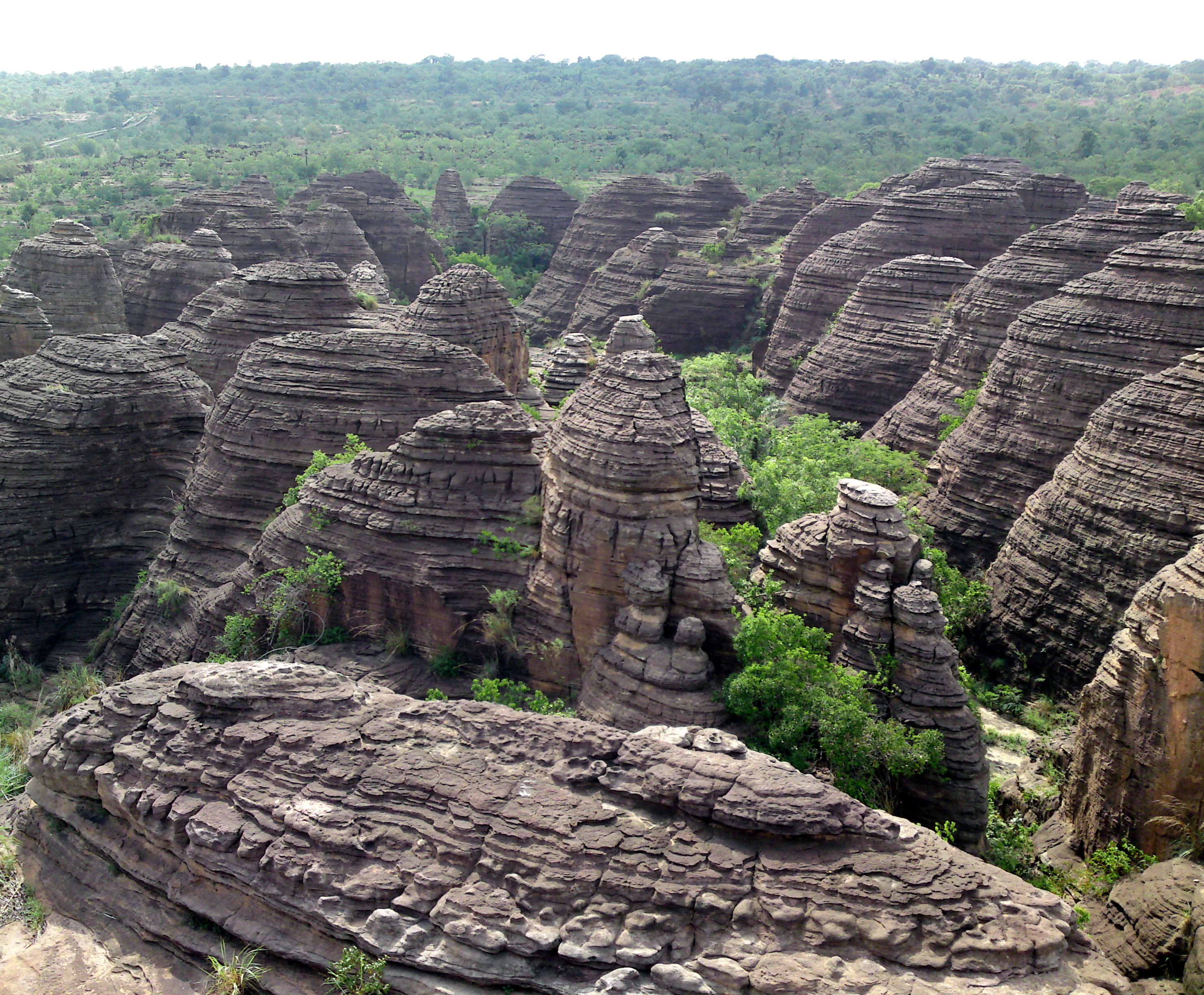 Dômes de Fabedougou Dômes de Fabedougou, Burkina Faso